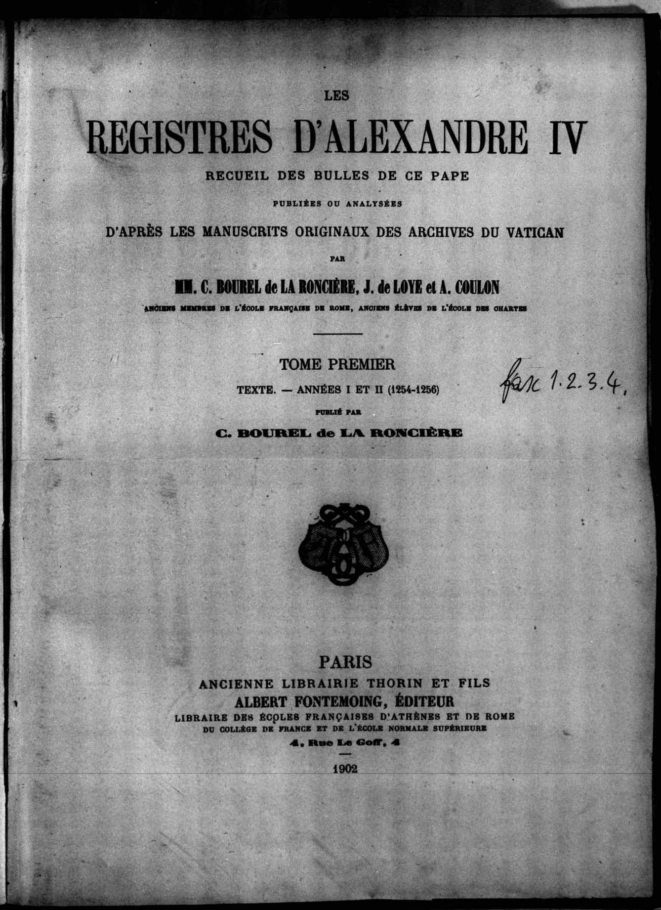 Frontespizio